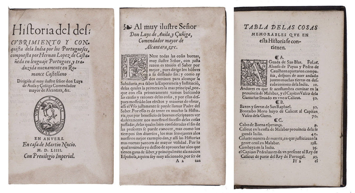 Portada y varias páginas de la Historia del descubrimiento y conquista de la India por los Portugueses compuesta por Hernan Lopez de Castañeda en lenguaje Portugues, y traduzida nueuamente en romance castellano, publicada en Amberes por Martin Nucio en 1554.